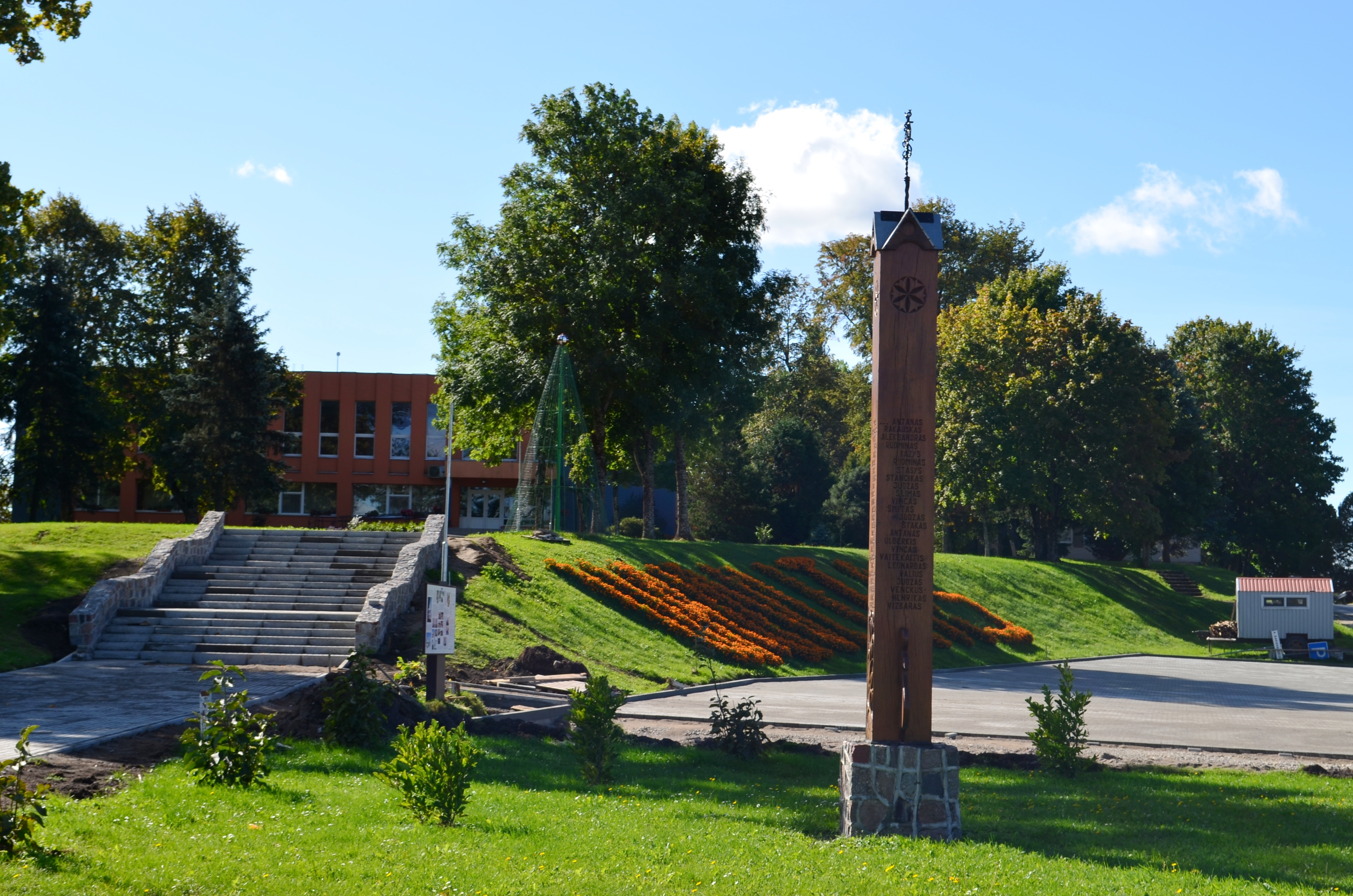 Žemaitėška: Pri Vainota muokīklas, Šėlotės rajuons